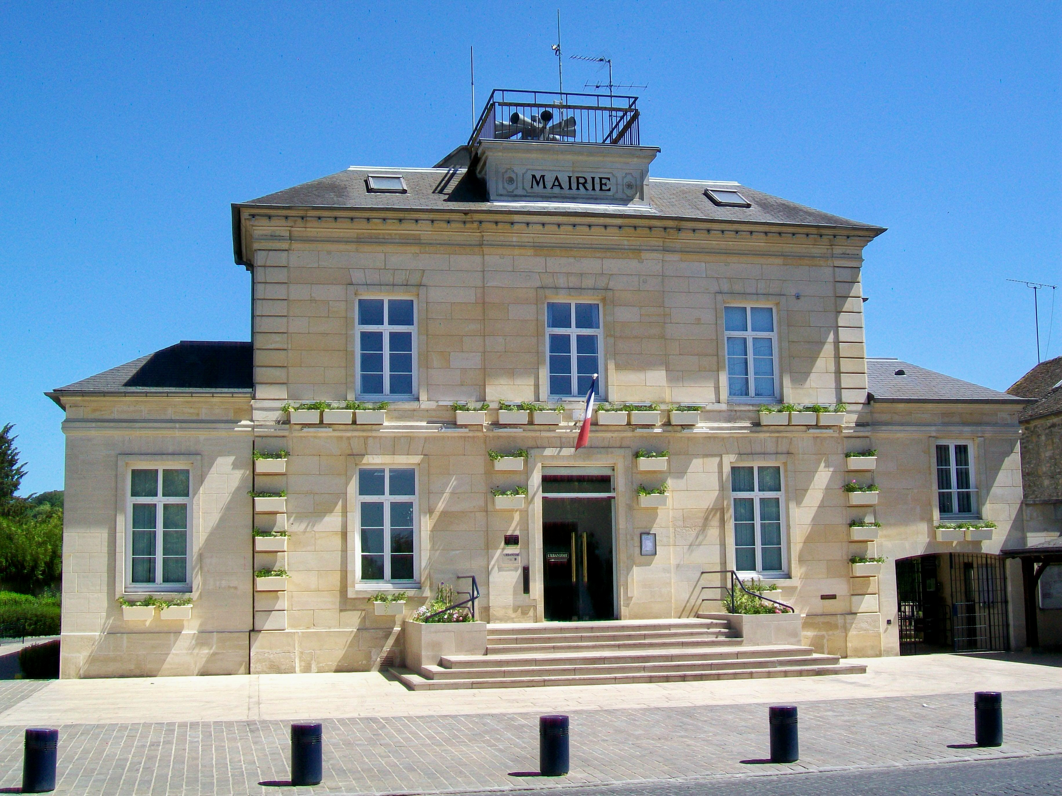 La mairie, rue de la Mairie (D 909).